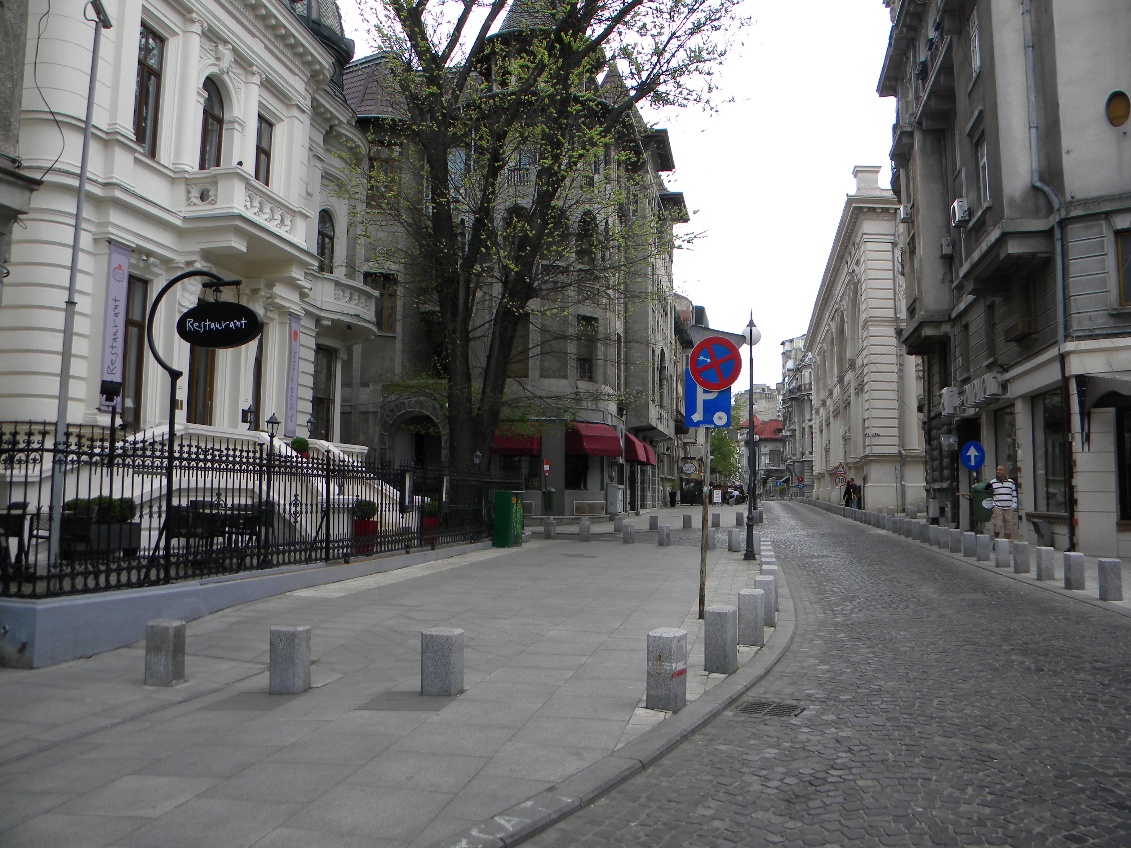 Bucuresti, Romania. Strada in Bucuresti